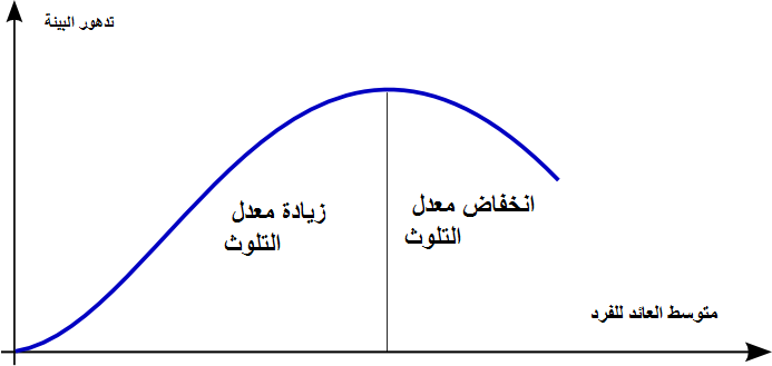 منحنى كوزنتش البيئي